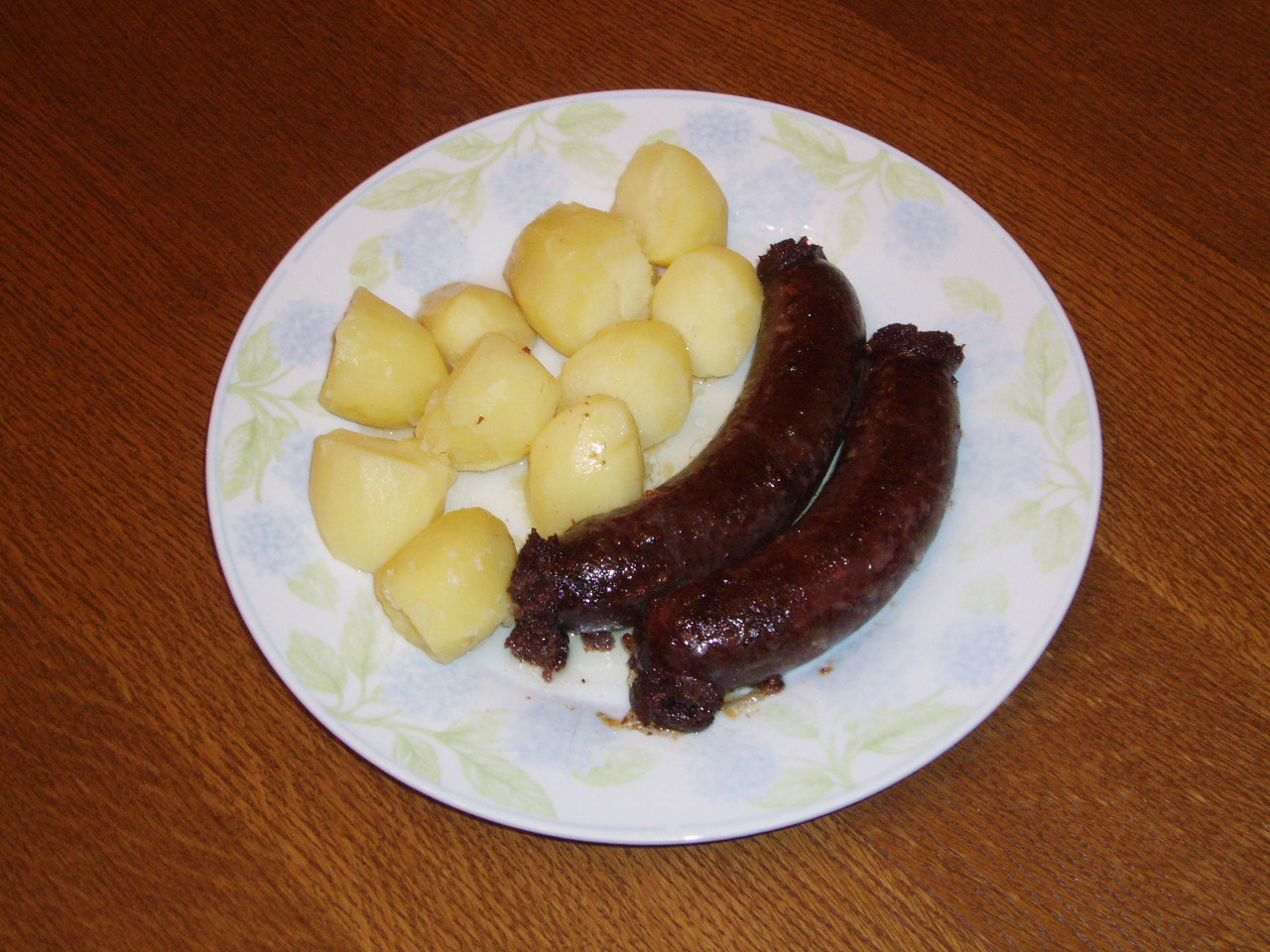 Gekachten Träipe mat Gromperen.